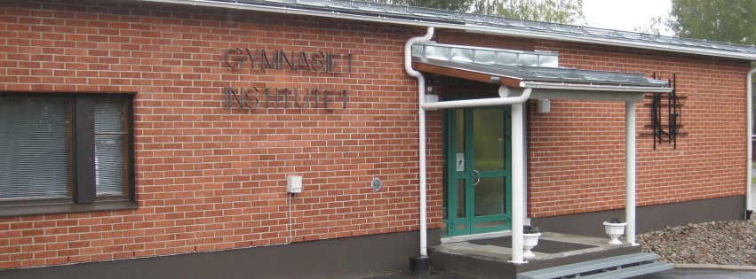 Gymnasiet i Petalax